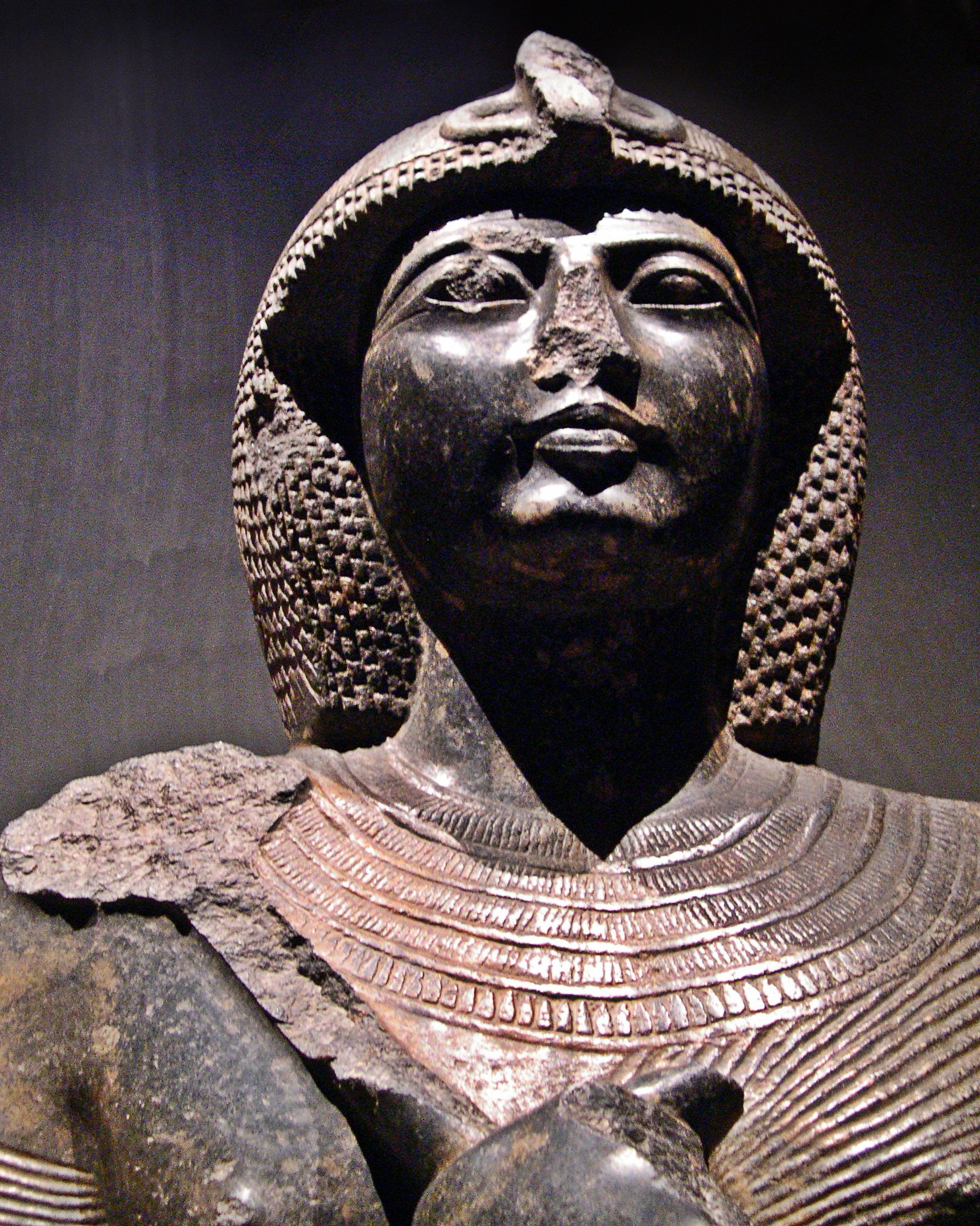 Busto de Ramsés II tallado en granito gris procedente de Tanis (delta del Nilo). Se conserva en el Museo Egipcio de El Cairo. XIX dinastía (cc. 1290 adC-1224 adC).El faraón tiene rasgos muy juveniles, por lo que su identidad no es segura. Tiene un collar usej y un cetro heqat (cayado de pastor)